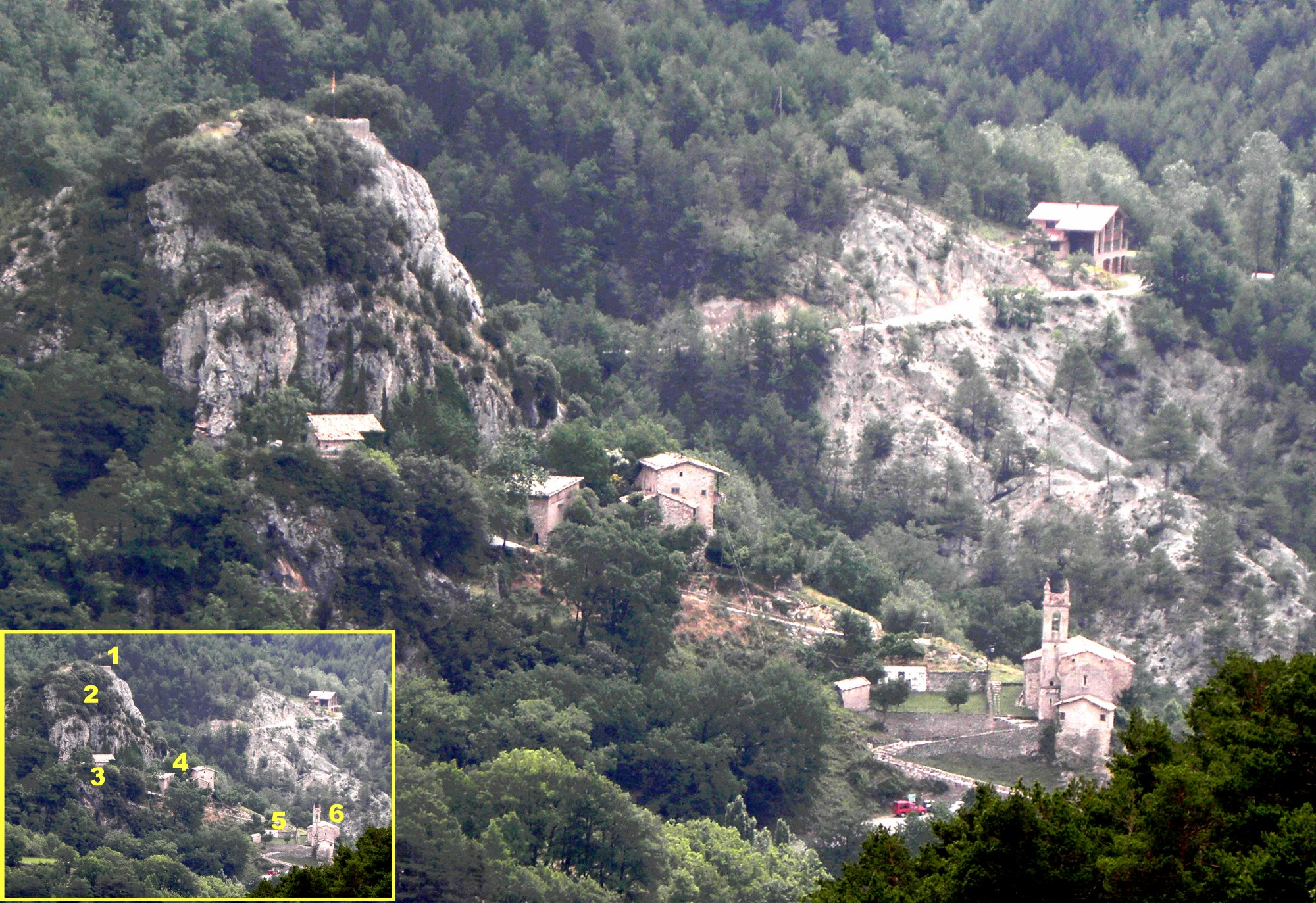 El nucli de la Pedra (municipi de la Coma i la Pedra), a la Vall de Lord (Solsonès), vist des de les Tremoledes (nord-oest) LLEGENDA: 1 - Restes del Castell de la Pedra. 2 - El Roc de la Pedra. 3 - Cal Marcó. 4 - El Xalet. 5 - El cementiri 6 - L'església parroquial de Sant Sadurní de la Pedra.